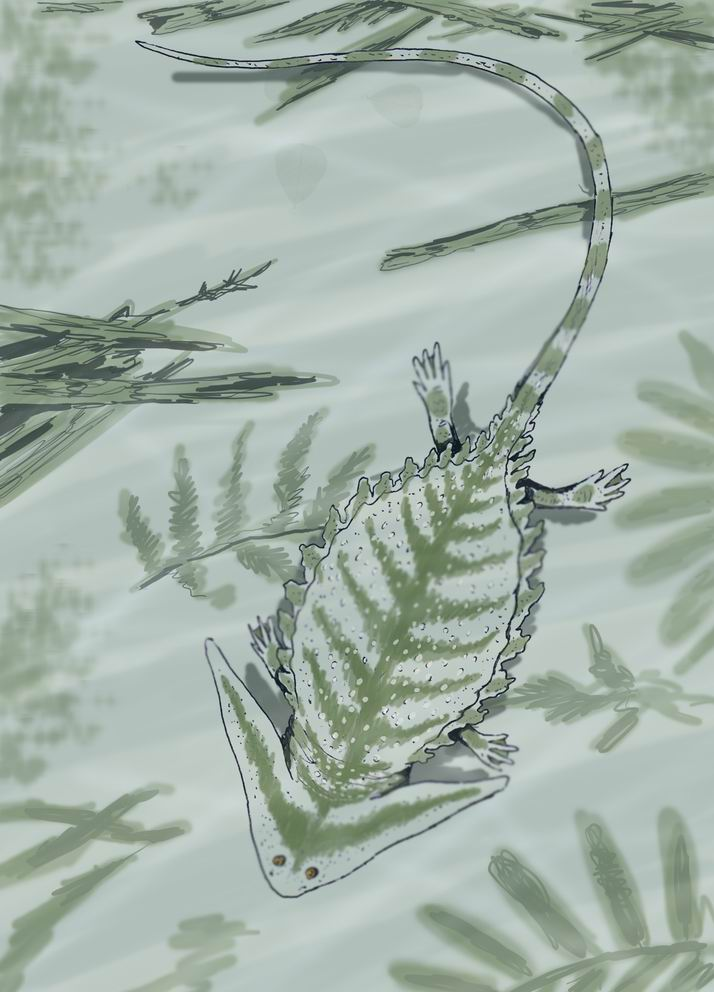 Diplocaulus.